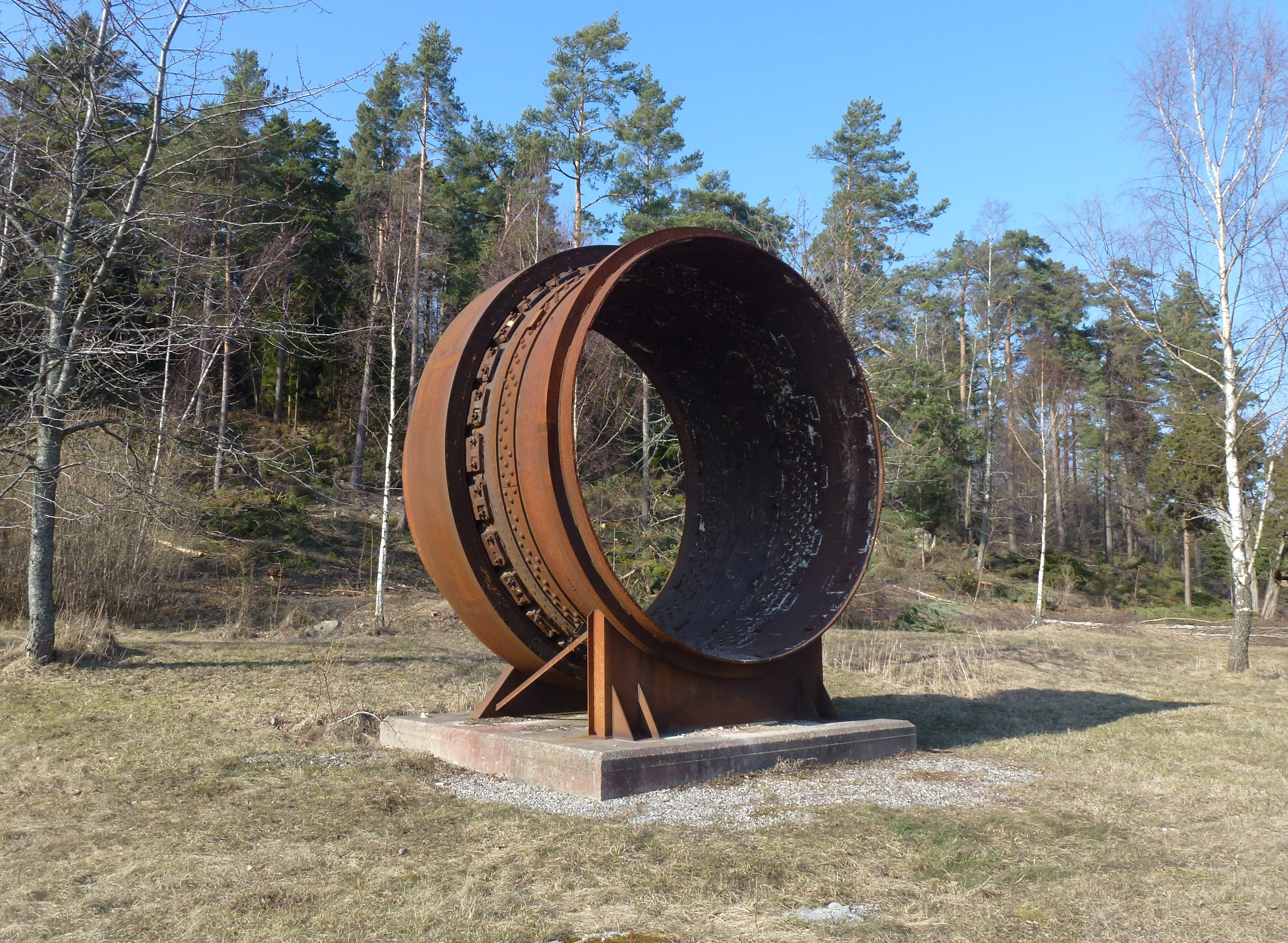 Stora Vika cementfabrik, del av roterugnen